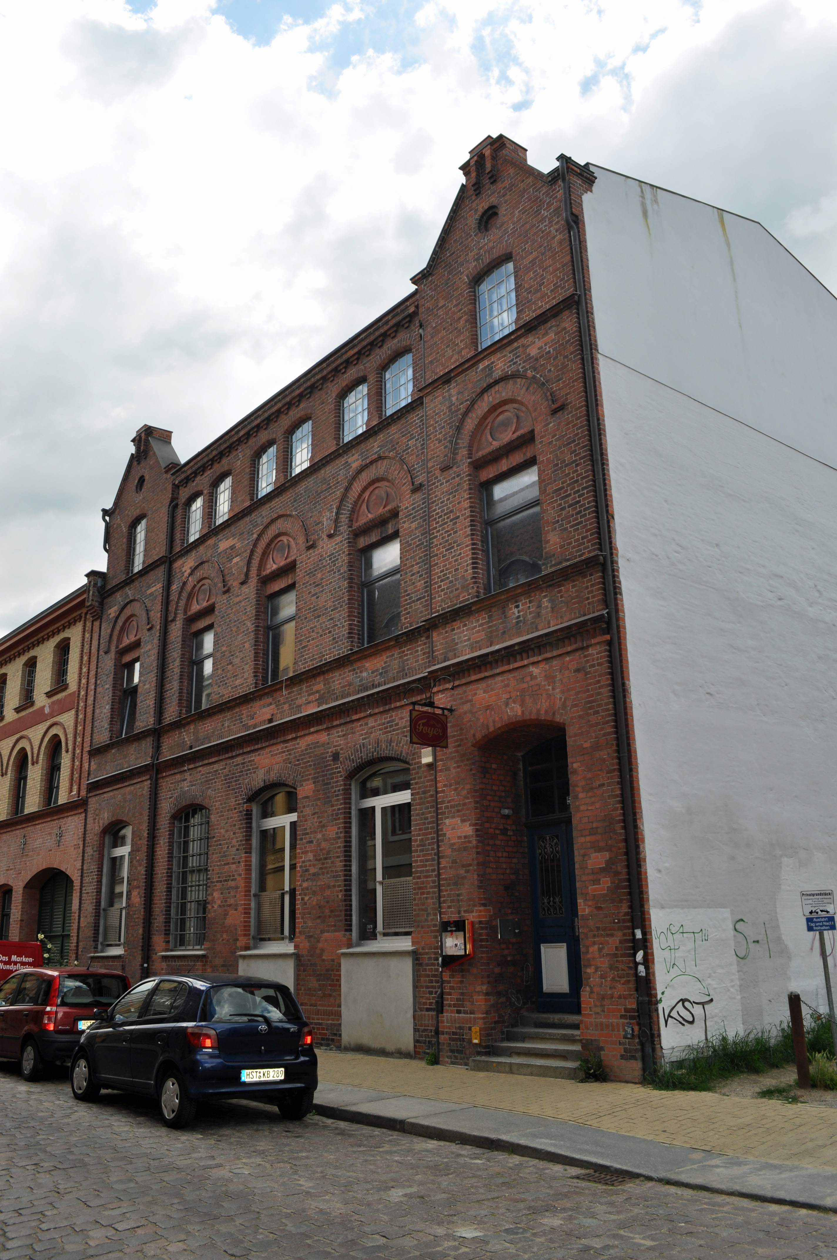 Das Foto zeigt ein Haus (bzw. Details des Hauses) in der Frankenstraße in Stralsund, Deutschland. Die Hausnummer steht im Dateinamen. Aufgenommen am 19. Juli 2011 vom Benutzer:Klugschnacker.